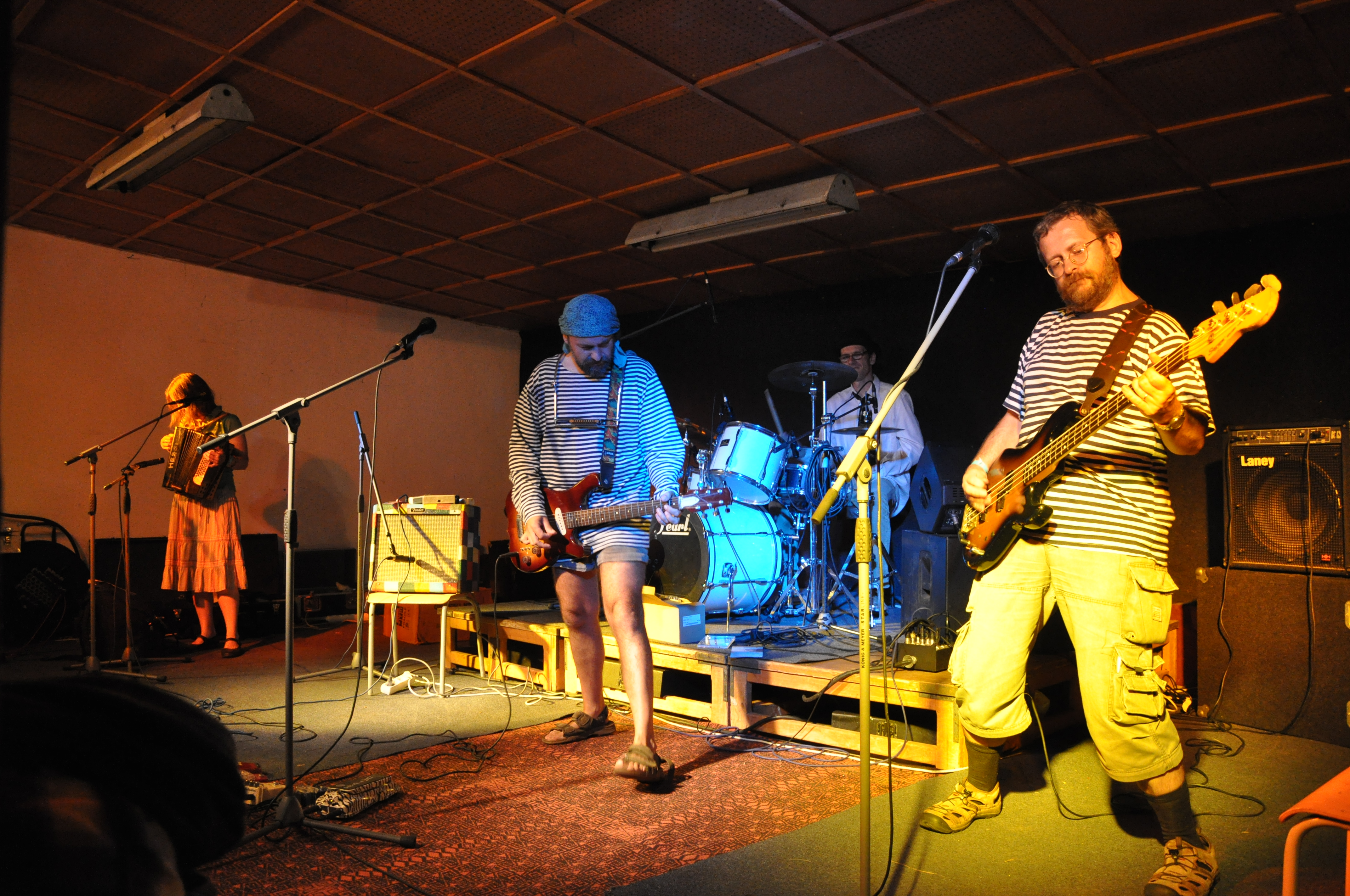 Původní Bureš na festivalu Otevřeno Jimramov 2009